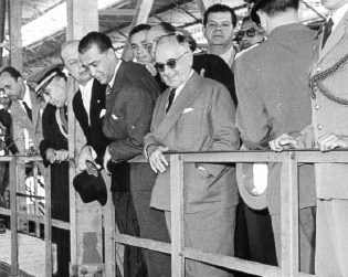 Getúlio Vargas e Juscelino Kubitschek na década de 1950.